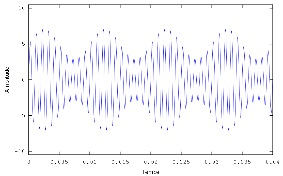 Exemple de modulation en amplitude. Cette image représente le signal modulé. Graphe tracé avec GNU Octave, ici s(t)=5*(1+2/5*sin(2*pi*100*t))*sin(2*pi*1000*t).